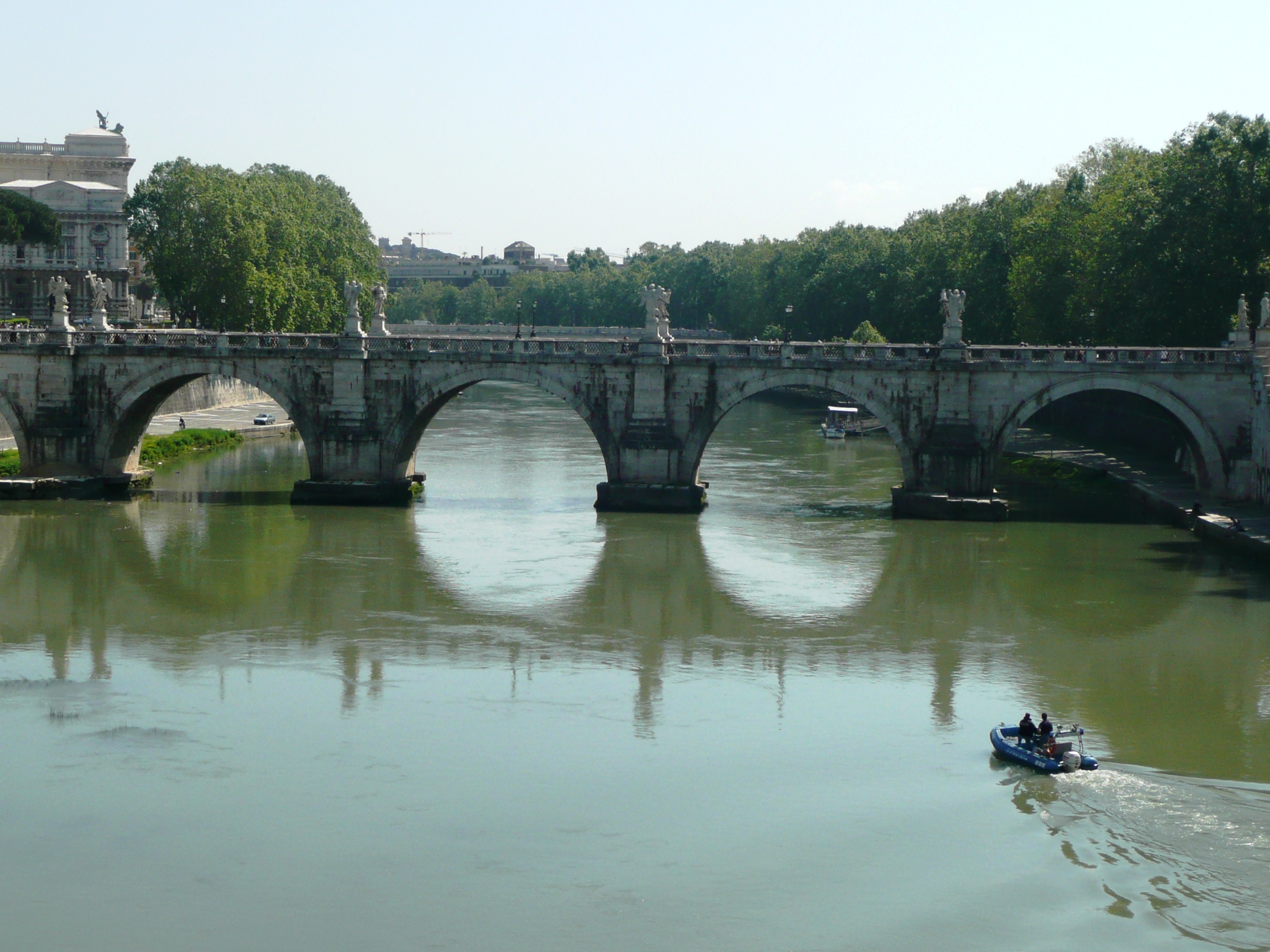 Міст Sant'Angelo в Римі